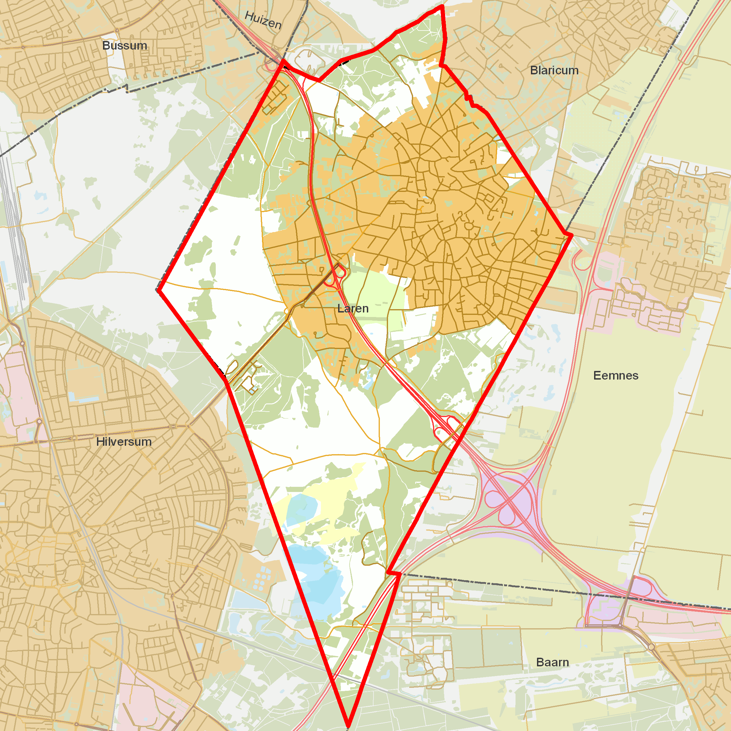 BAG woonplaatsen - Gemeente Laren.png